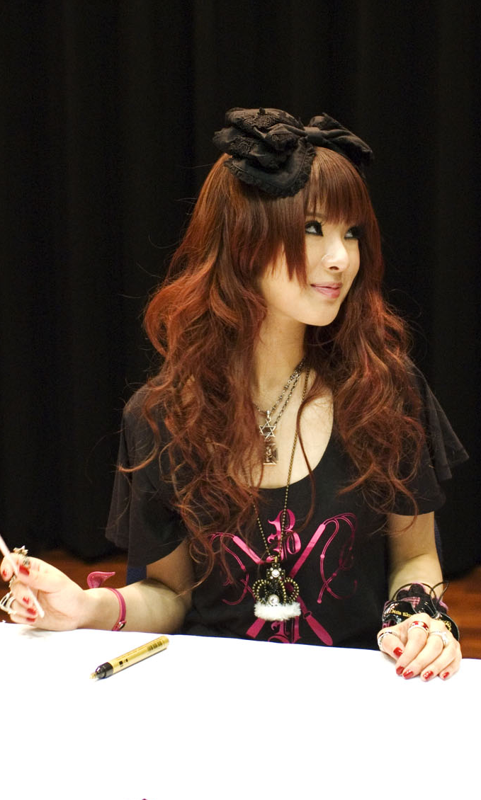 Nana Kitade - Dédicace en Allemagne